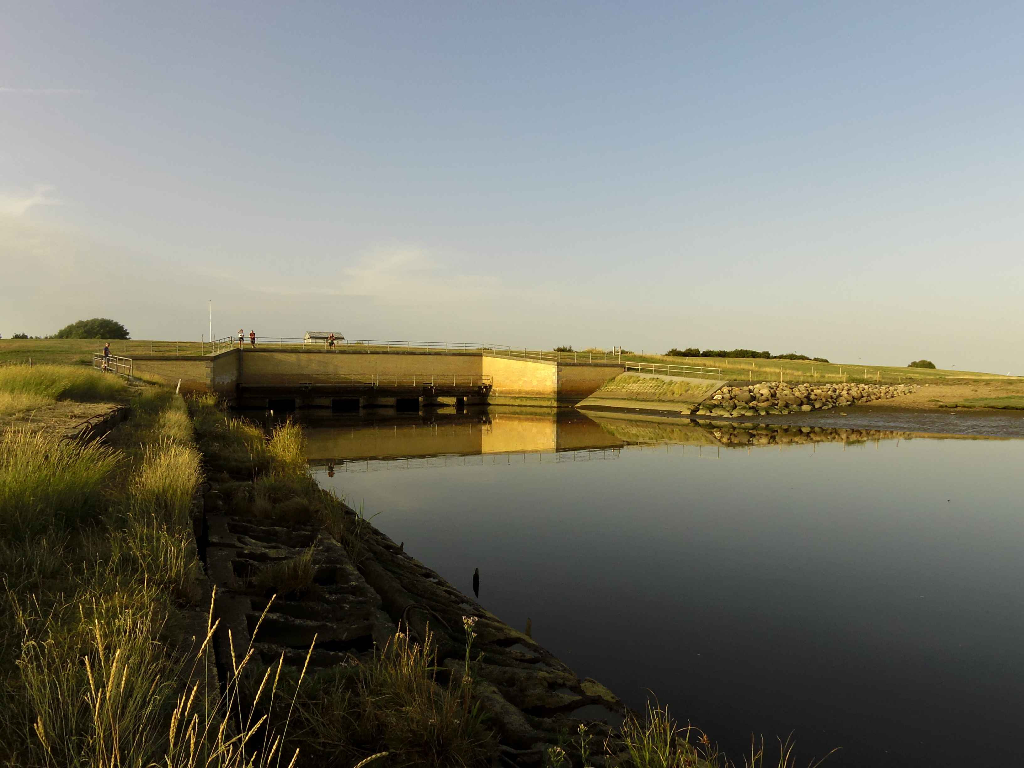 Sneum Sluse